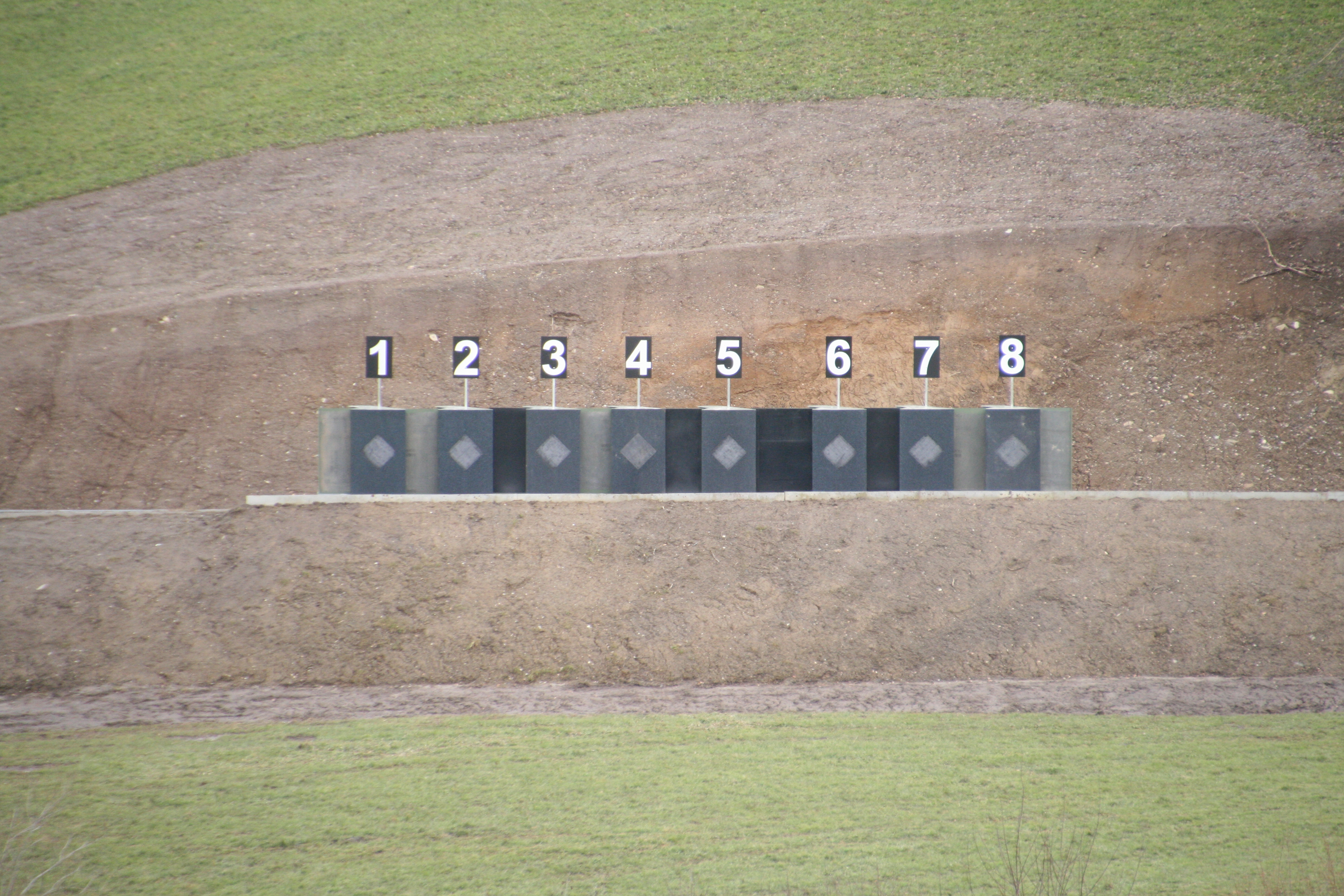 Kugelfang einer 300m-Schiessanlage